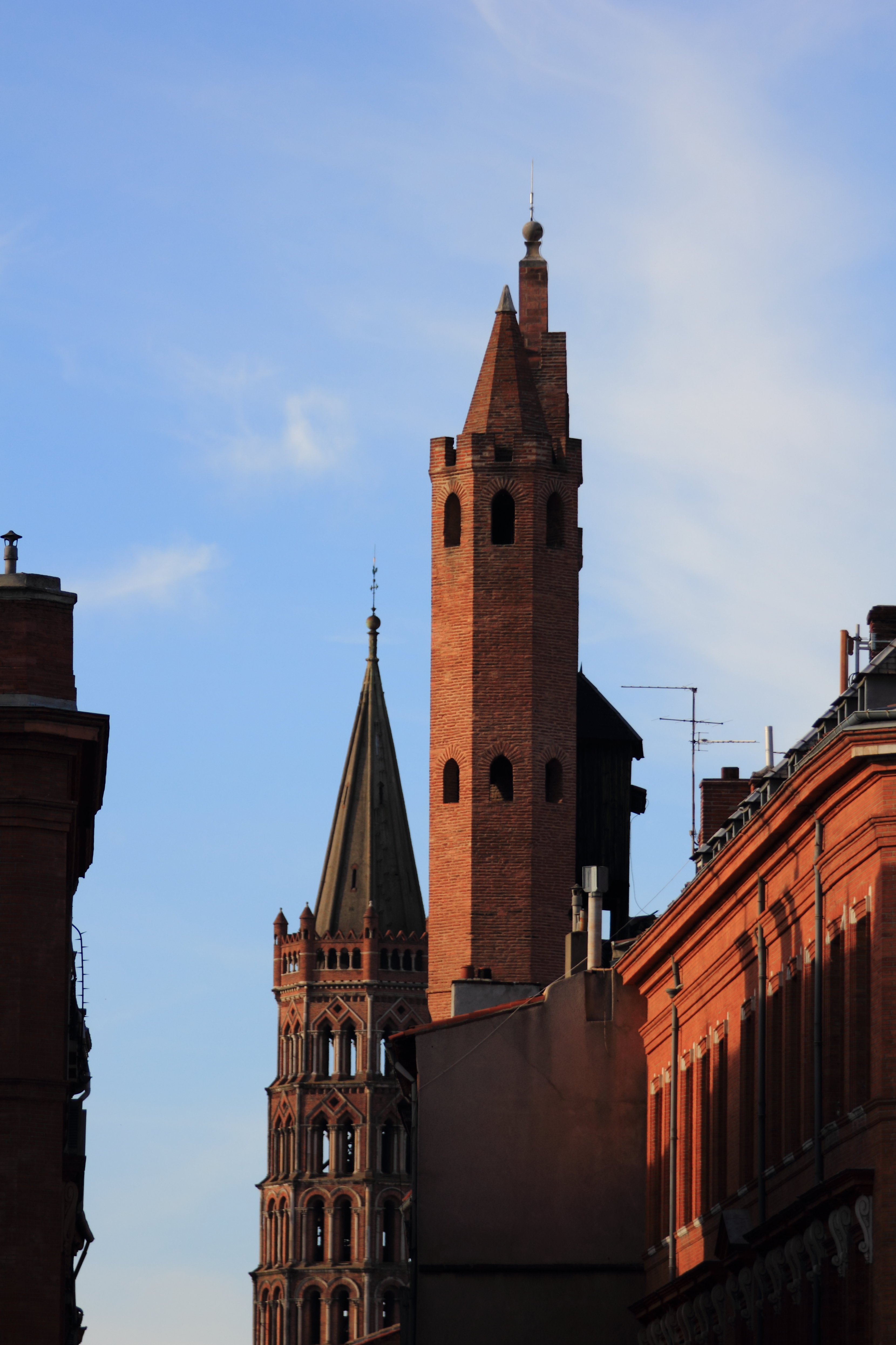 La rue du Taur à Toulouse: Tour de Notre dame du Taur et clocher de la basilique Saint-Sernin